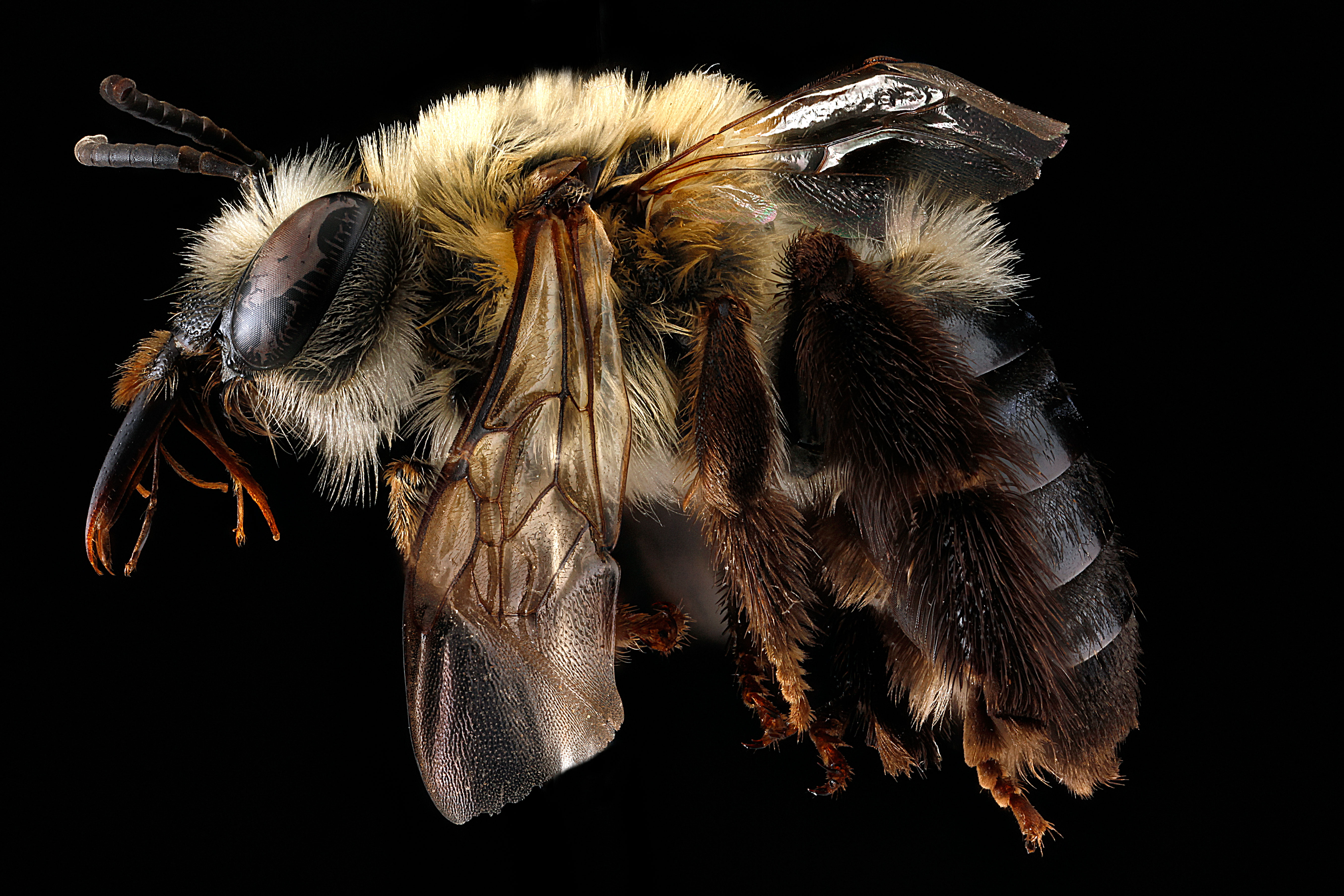 Eucera rosae, female, Maryland